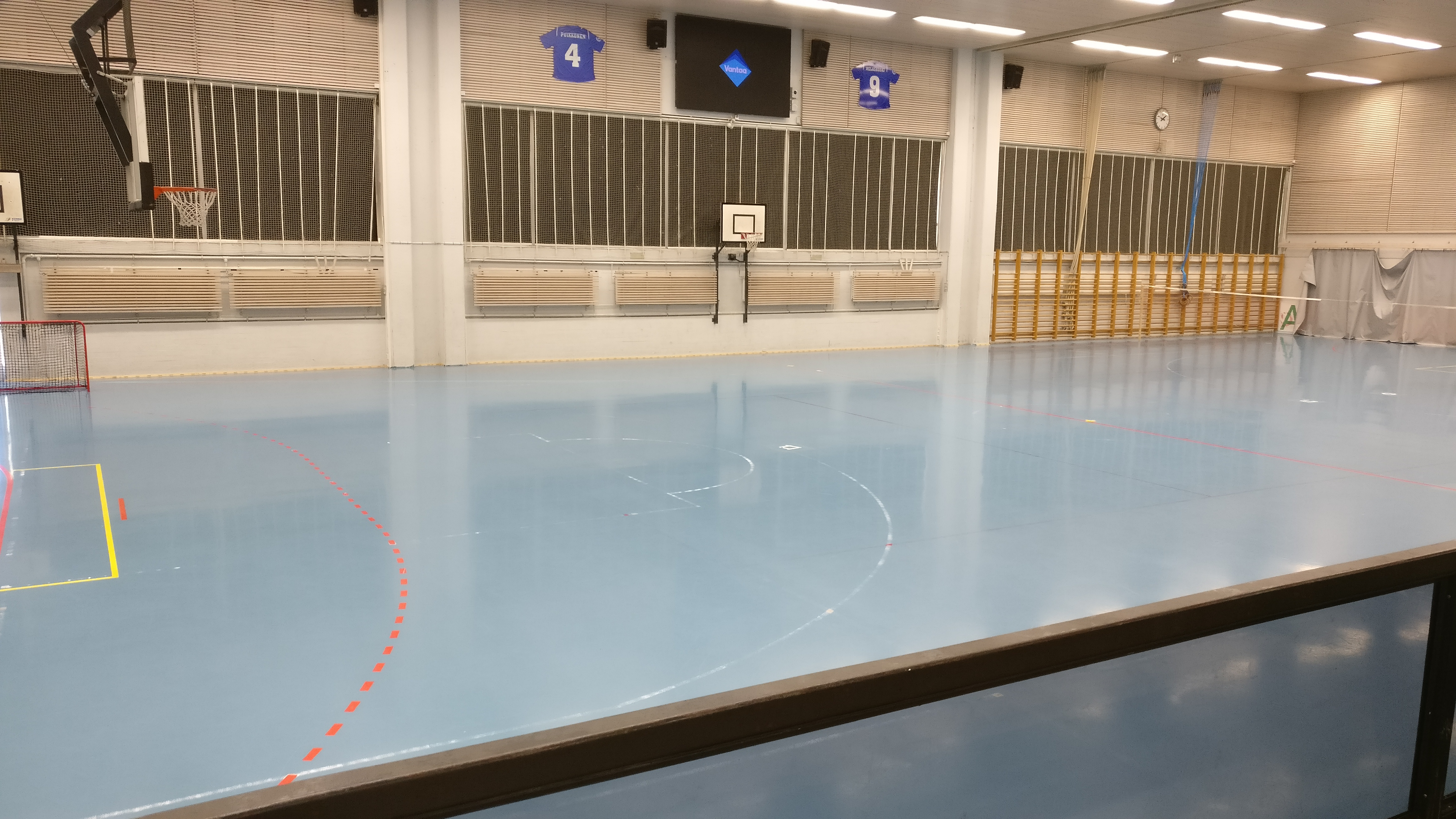 Sisäkuva Myyrmäen urheilutalon salista. Kuva on otettu katsomon penkeiltä.